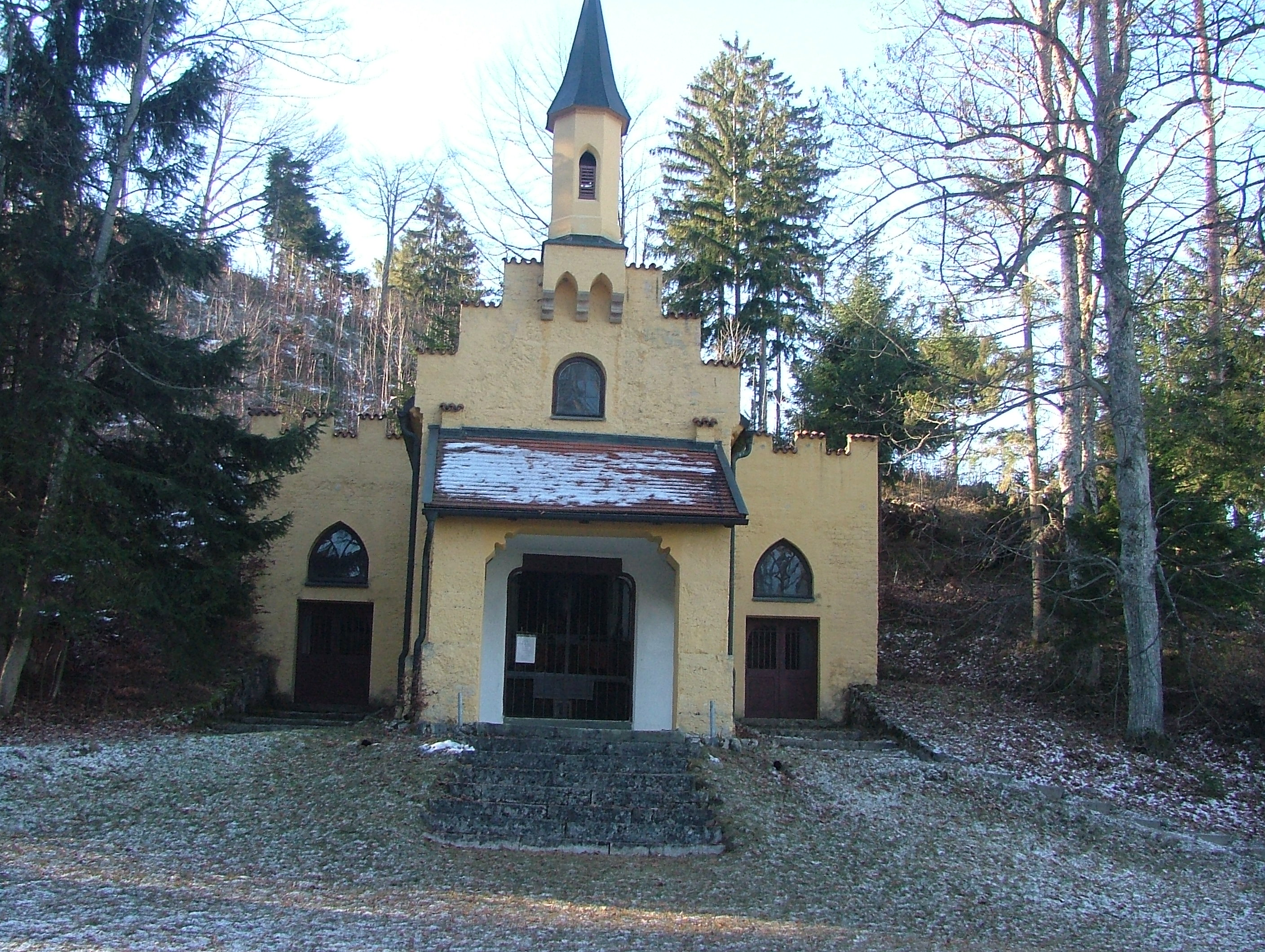 Marienkapelle